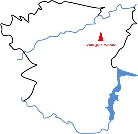 Vitré au IIIe siècle avant JC